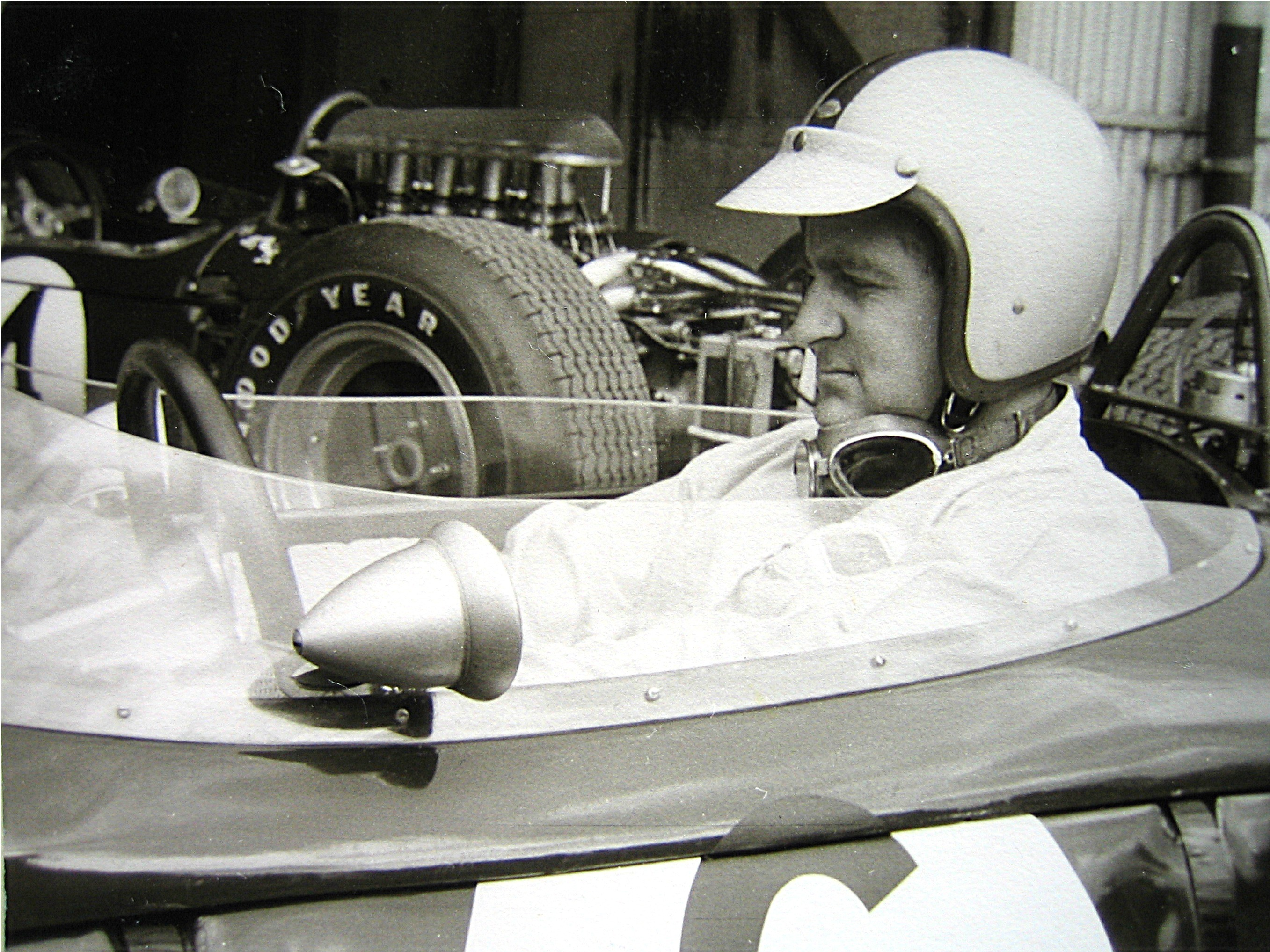 Denis Hulme 1965 im Brabham Climax im Fahrerlager des Nürburgrings